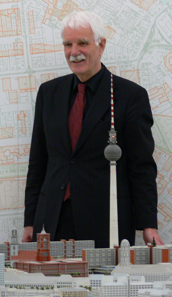 Hans Stimmann (vor dem Berliner Planmodell der DDR aus dem Jahr 1989, ausgestellt in der Senatsverwaltung für Stadtentwicklung, Leipziger Straße)